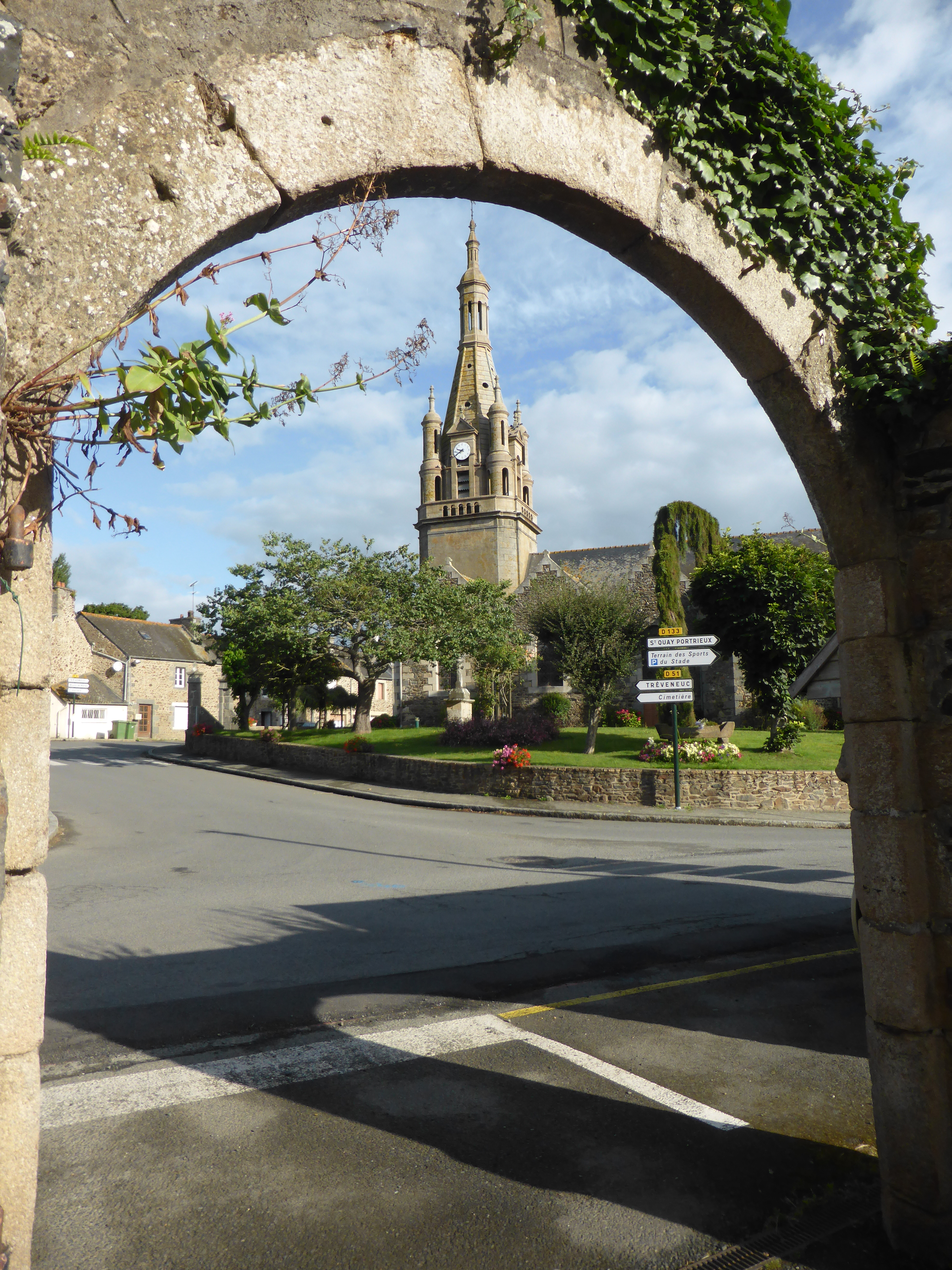 L'église Saint-Pierre de Plourhan, dans les Côtes-d'Armor, vue à travers une arche près de la mairie.